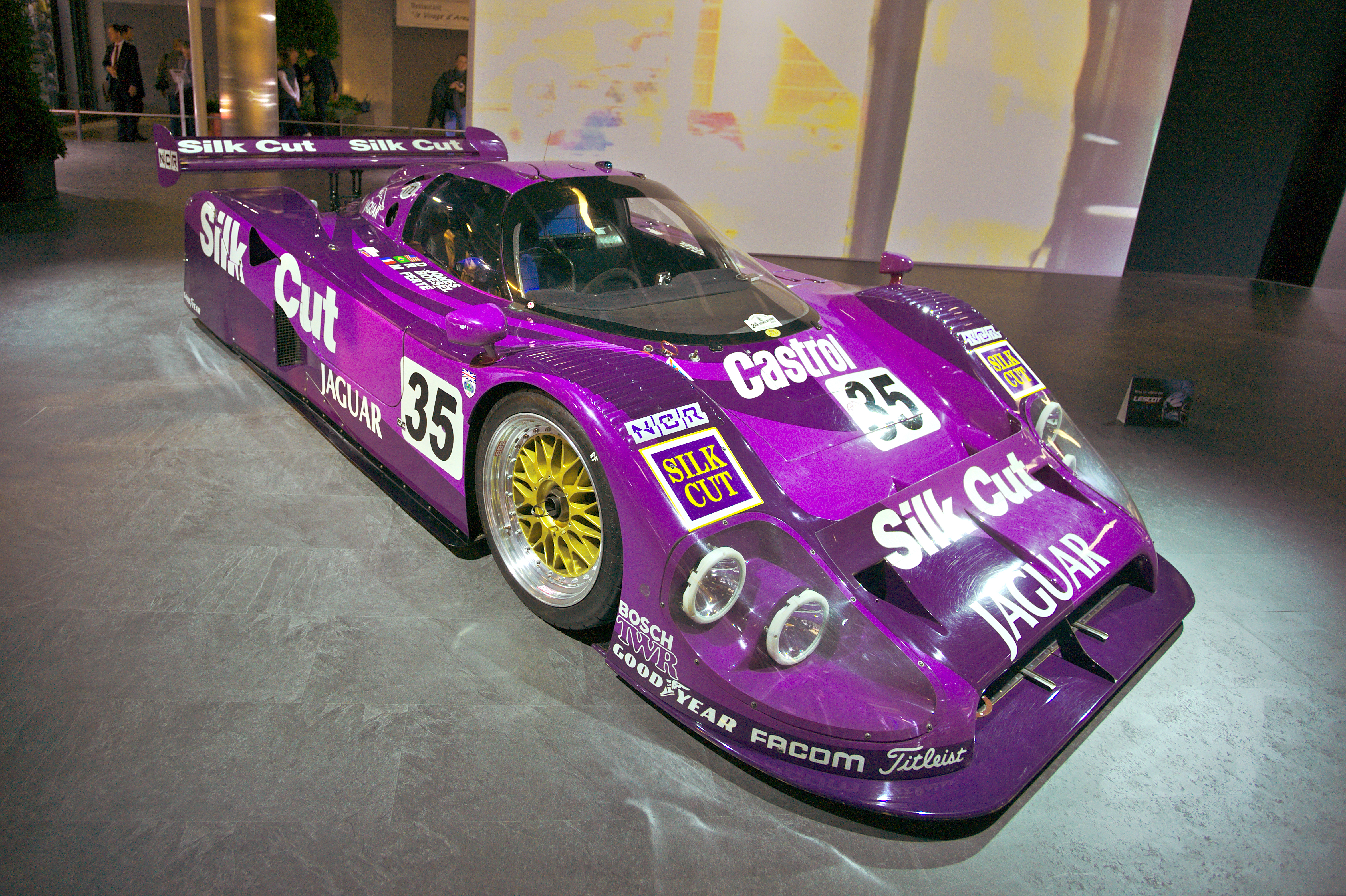 Salon de l'auto de Genève 2014 - 20140305 - Expo Le Mans